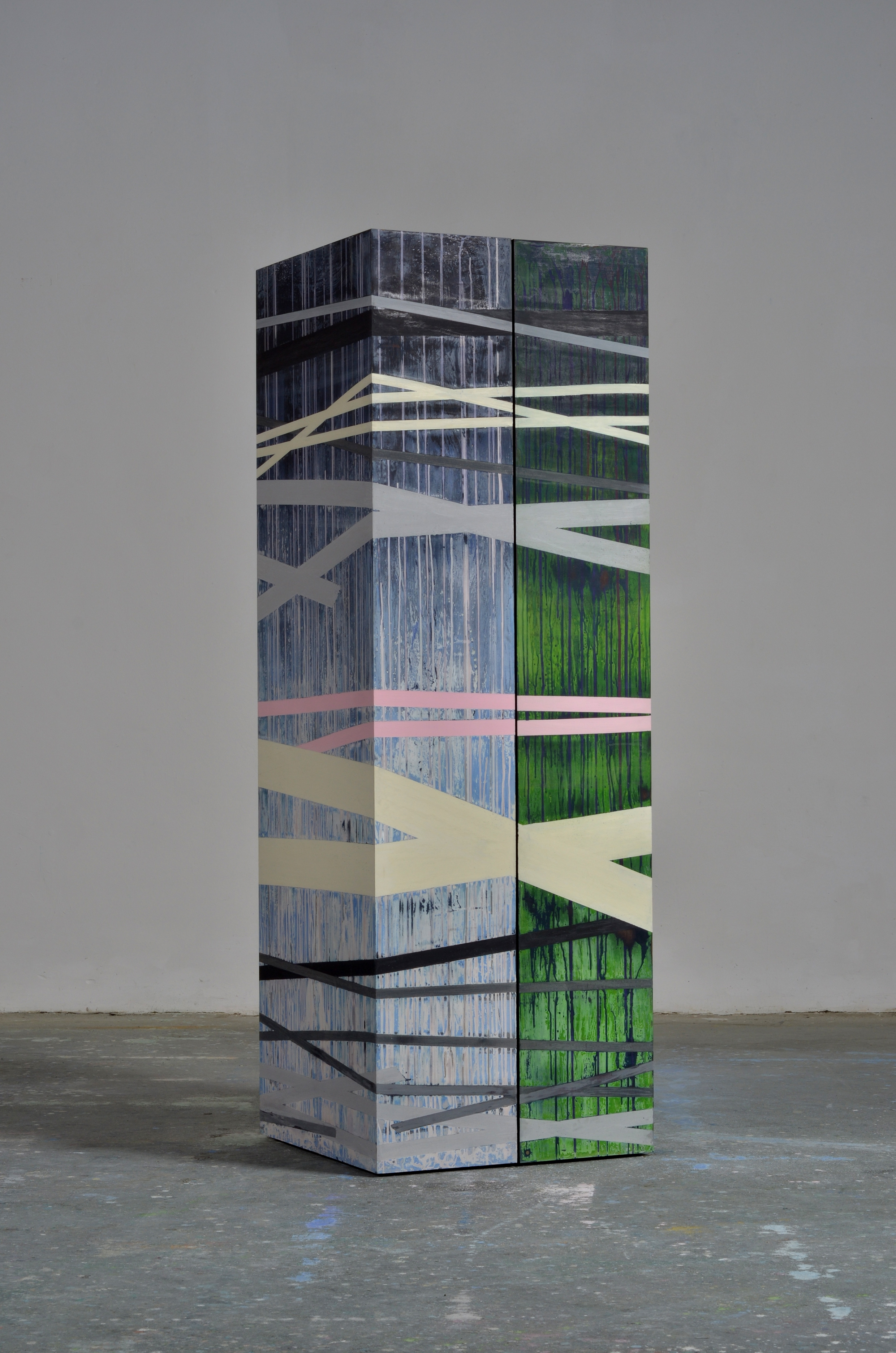 einzelbild2